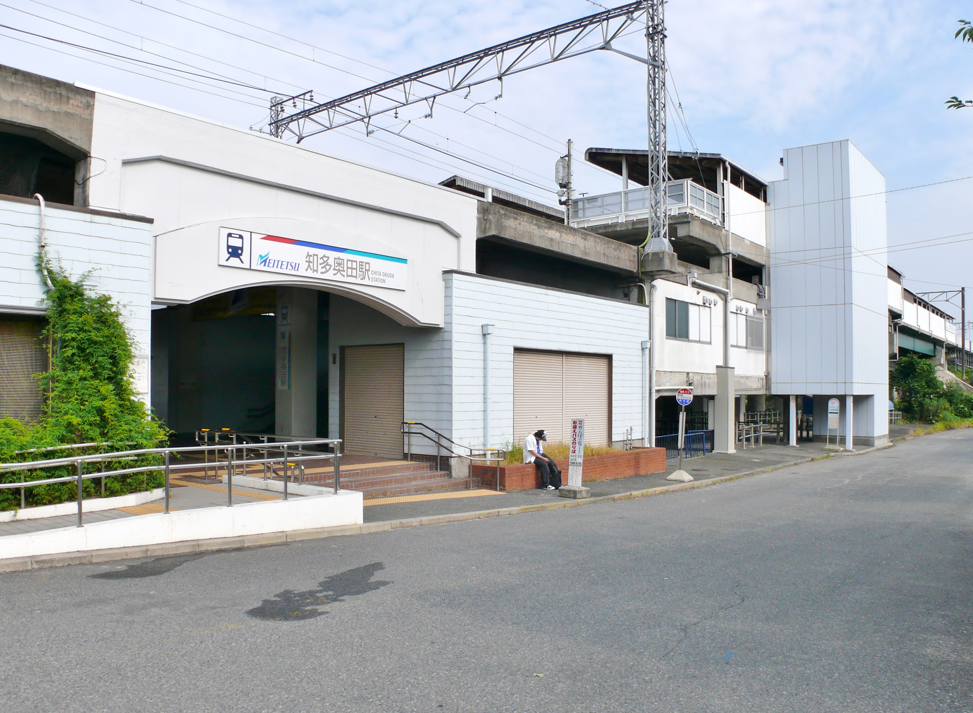 愛知県知多郡美浜町にある名古屋鉄道の知多奥田駅